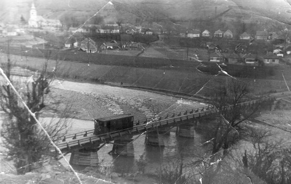 Міст в c. Неліпино. Фото початку ХХ століття